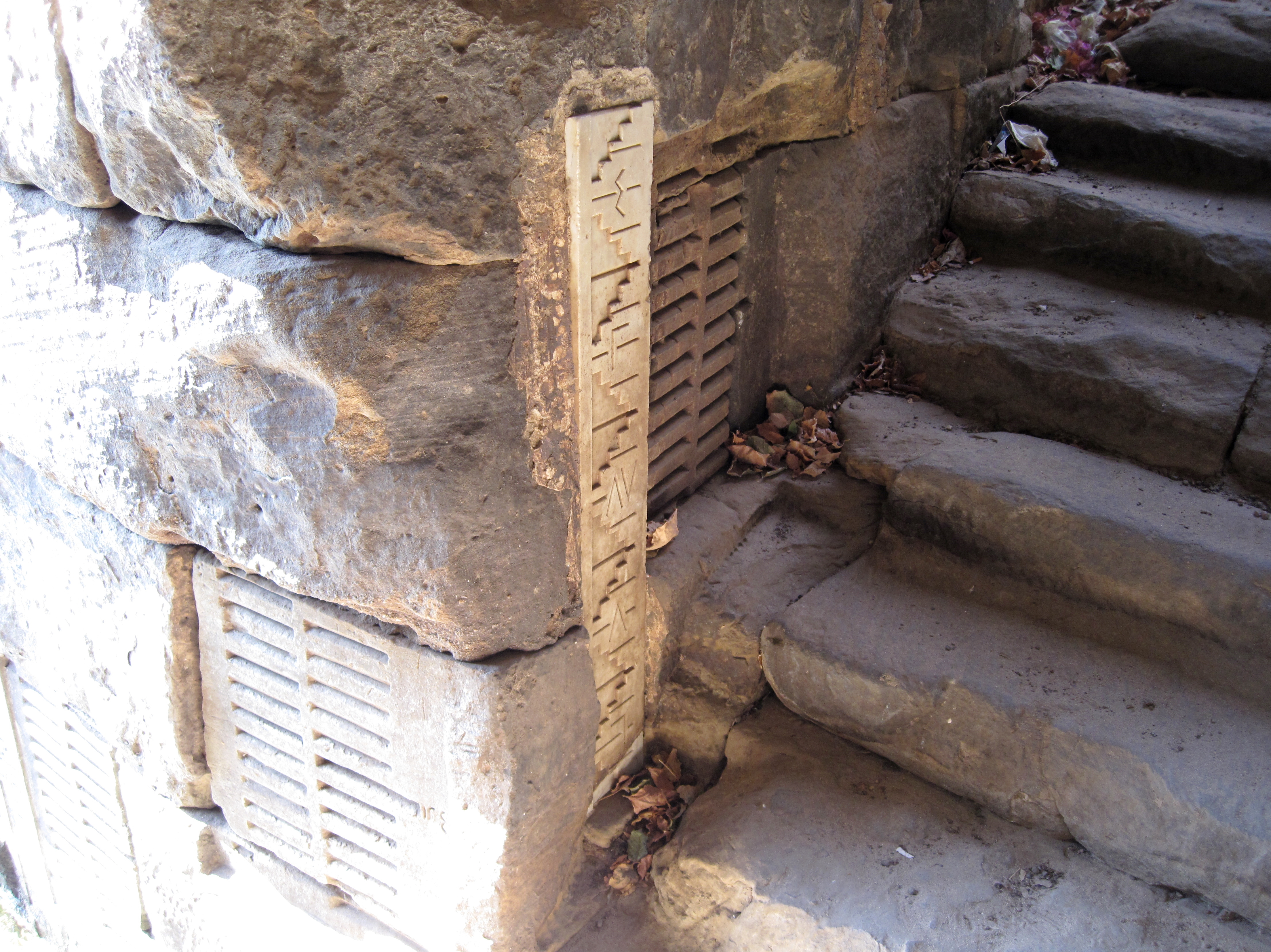 Nilometer an der Südostseite der Insel Elephantine in Assuan, Ägypten